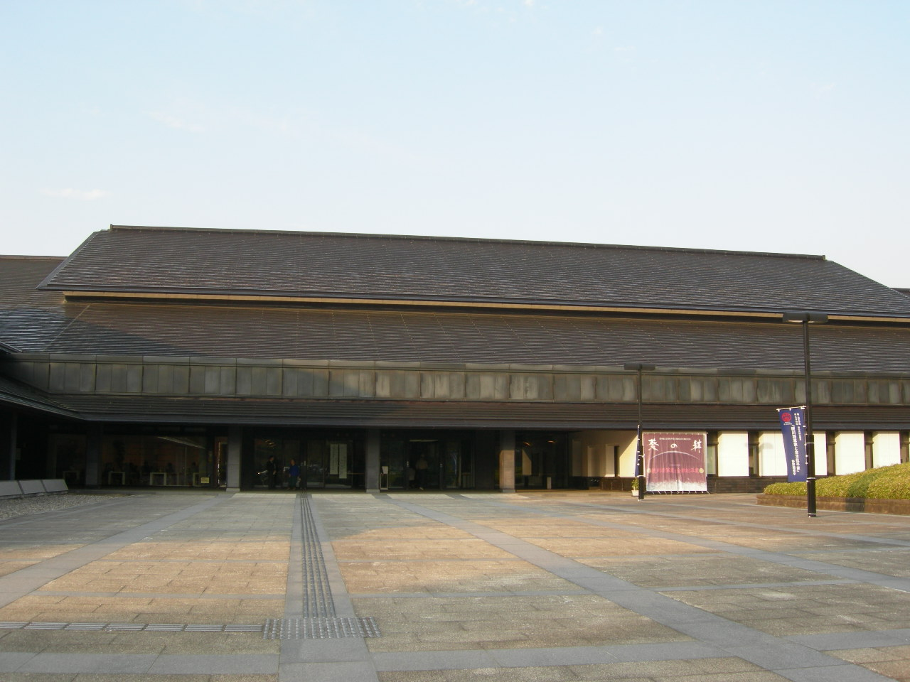 福島県立博物館（Fukushima pref. museum）